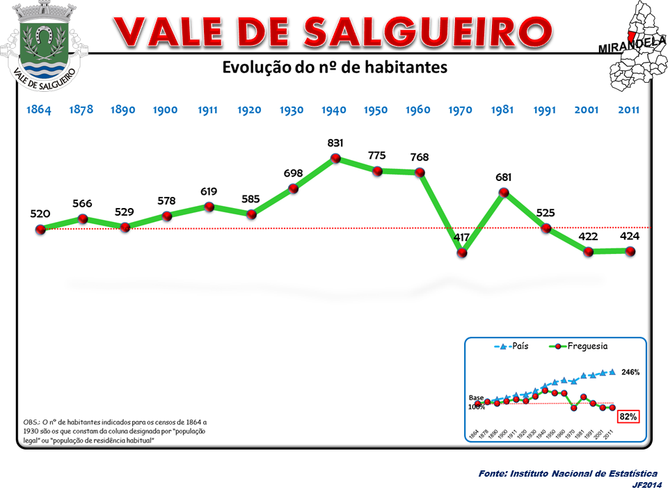 Evolução da População 1864 / 2011